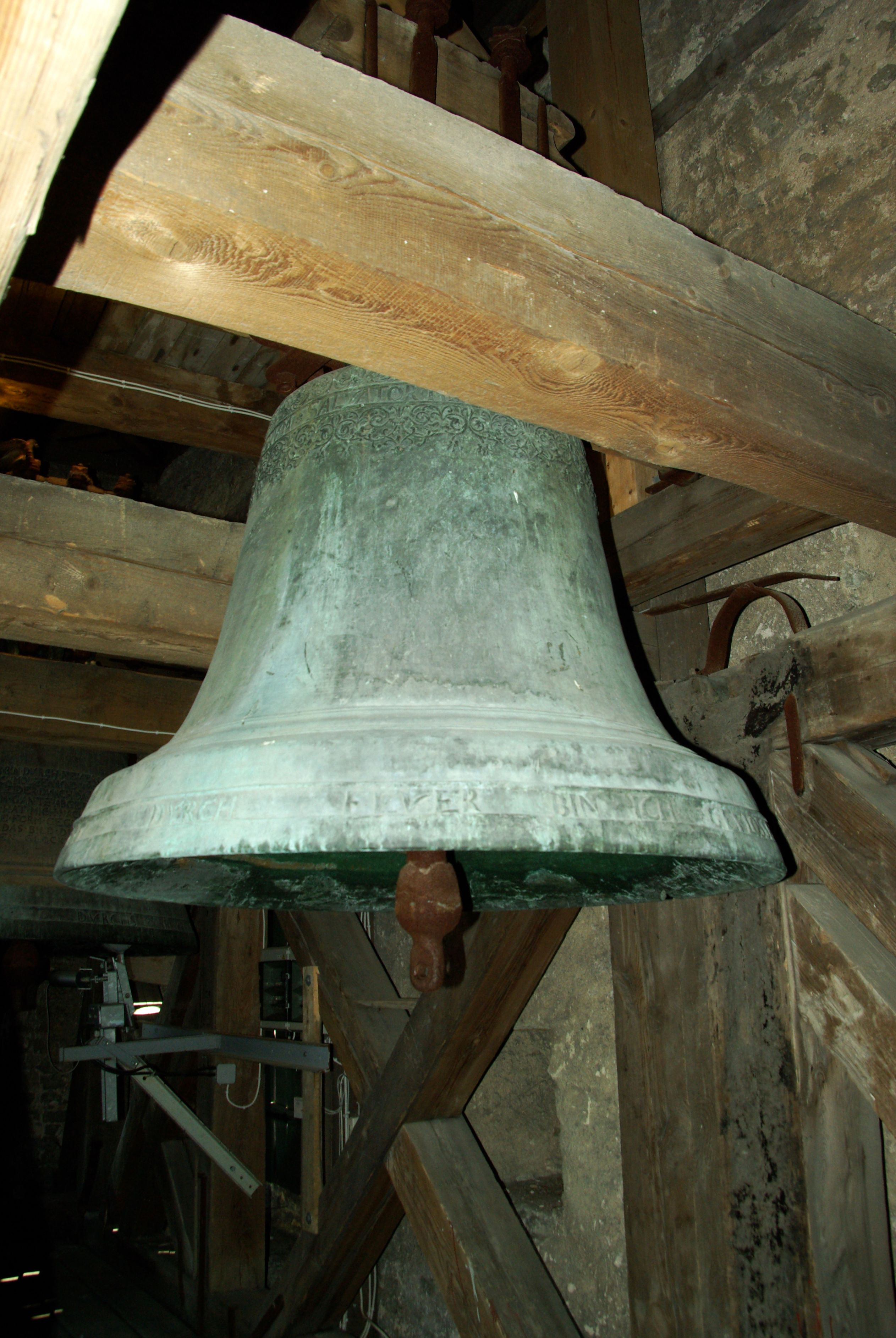 Die 1685 von Detlof Riedeweg in Reval für die dortige Domkirche St. Marien neu gegossene Salvatorglocke ...